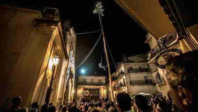 L'Albero della Cuccagna sorretto nel centro della piazza del paese